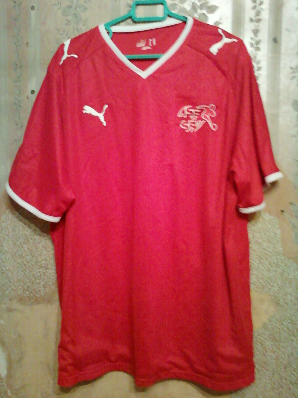 Maillot domicile de l'équipe de Suisse de football 2008-2009